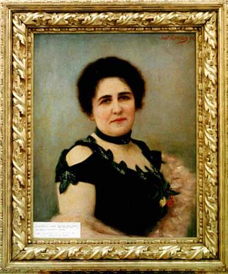 Thomová